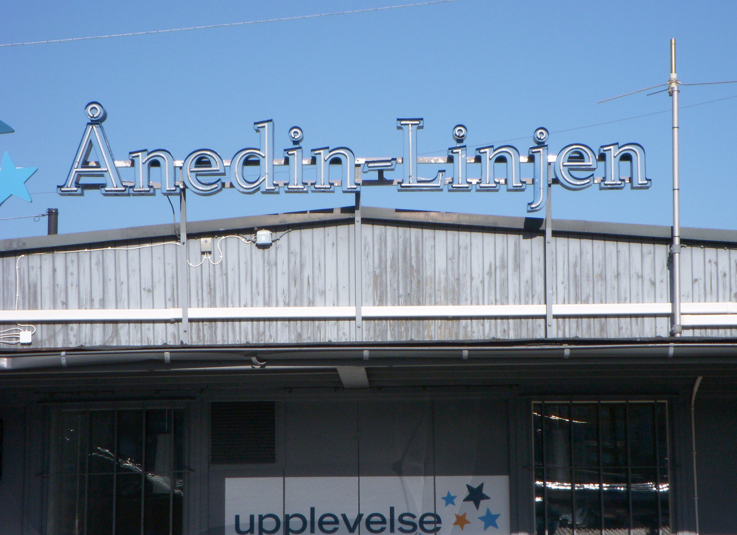 Tullhus 1, Ånedinlinjen